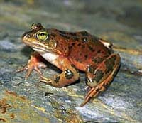 Oregon Spotted Frog (Rana pretiosa)